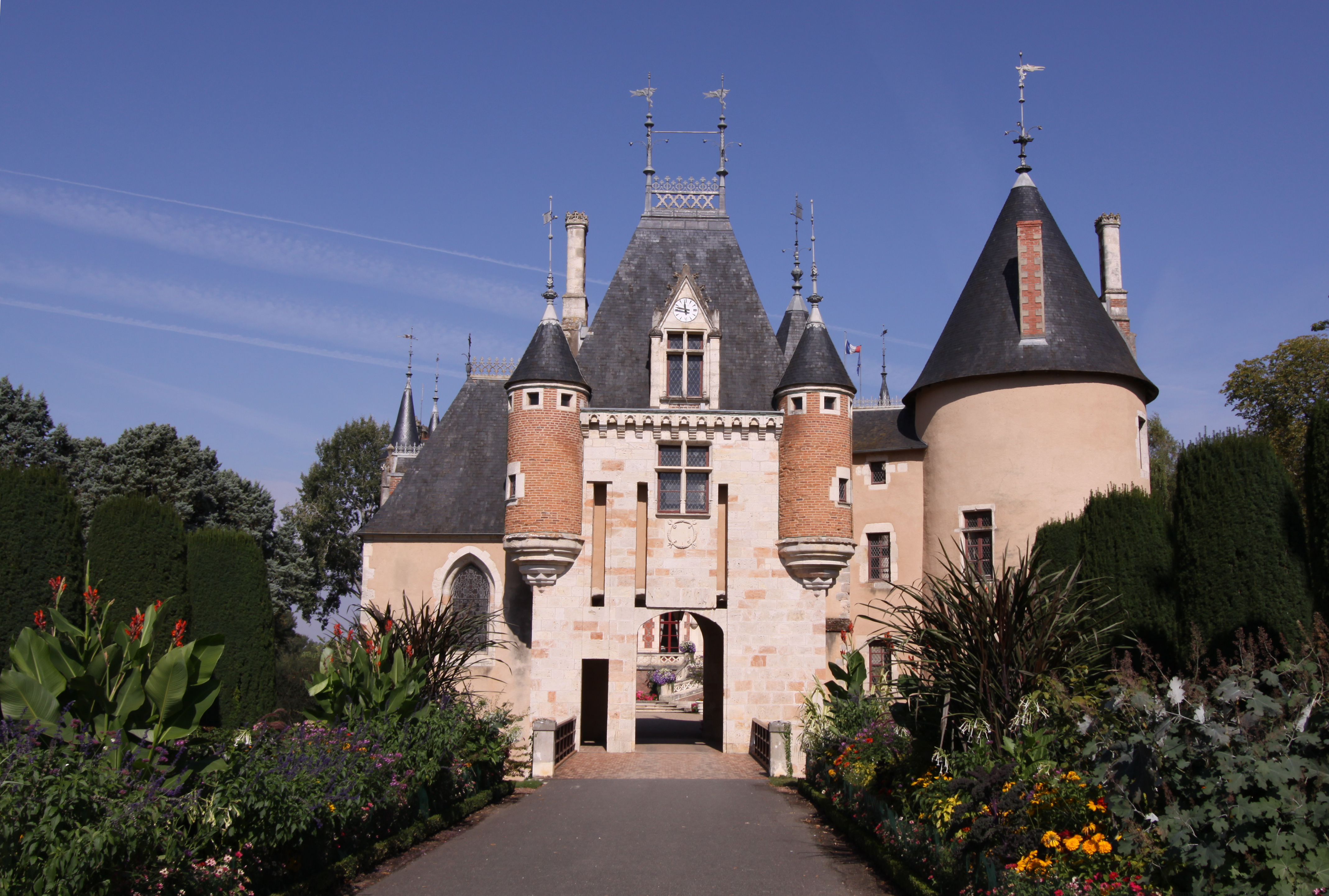 Schloss Saint-Florent-sur-Cher, Rathaus der Stadt Saint-Florent-sur-Cher im französischen Département Cher - Torhaus